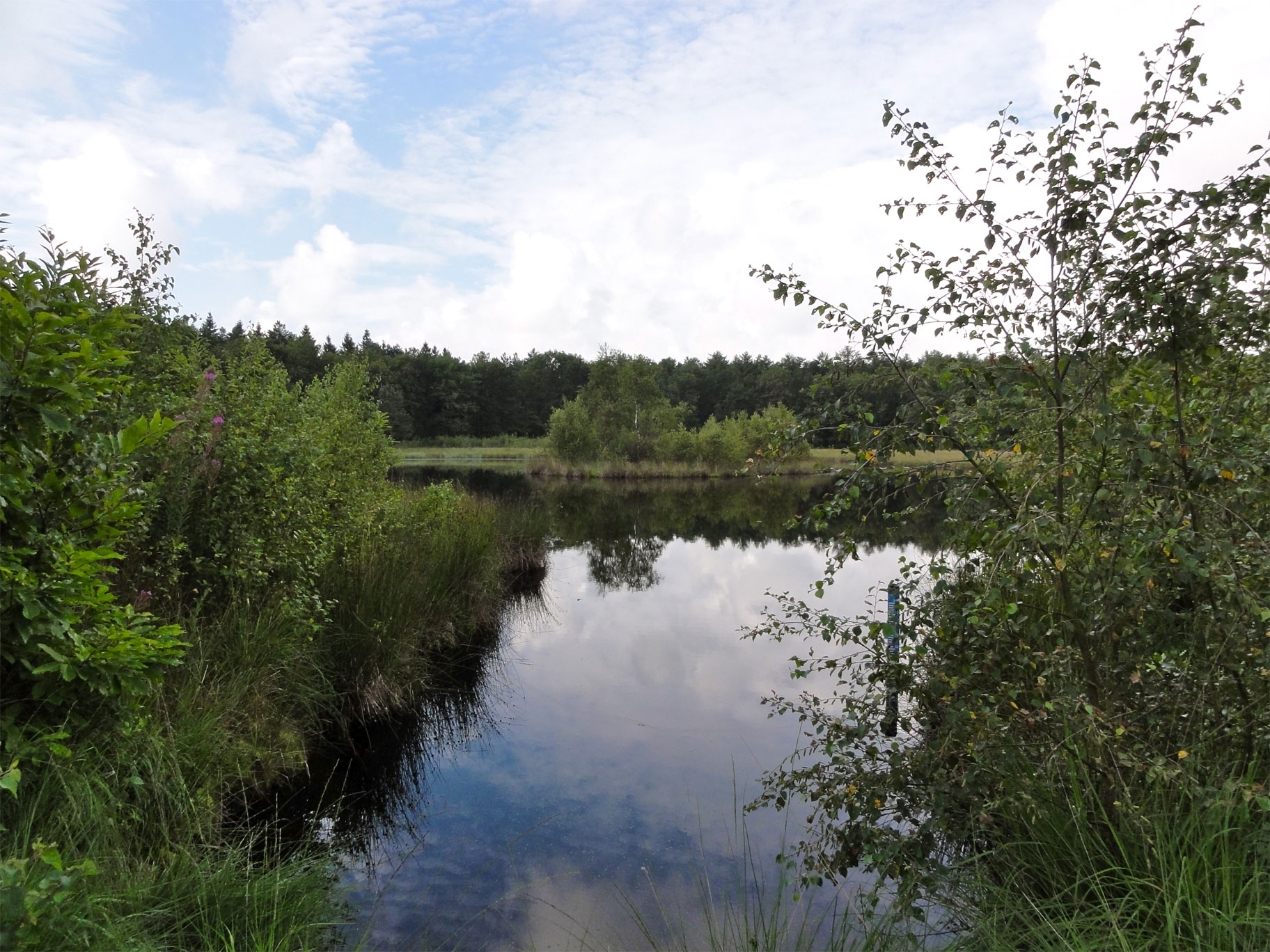 Vennetje in de Duurswouderheide